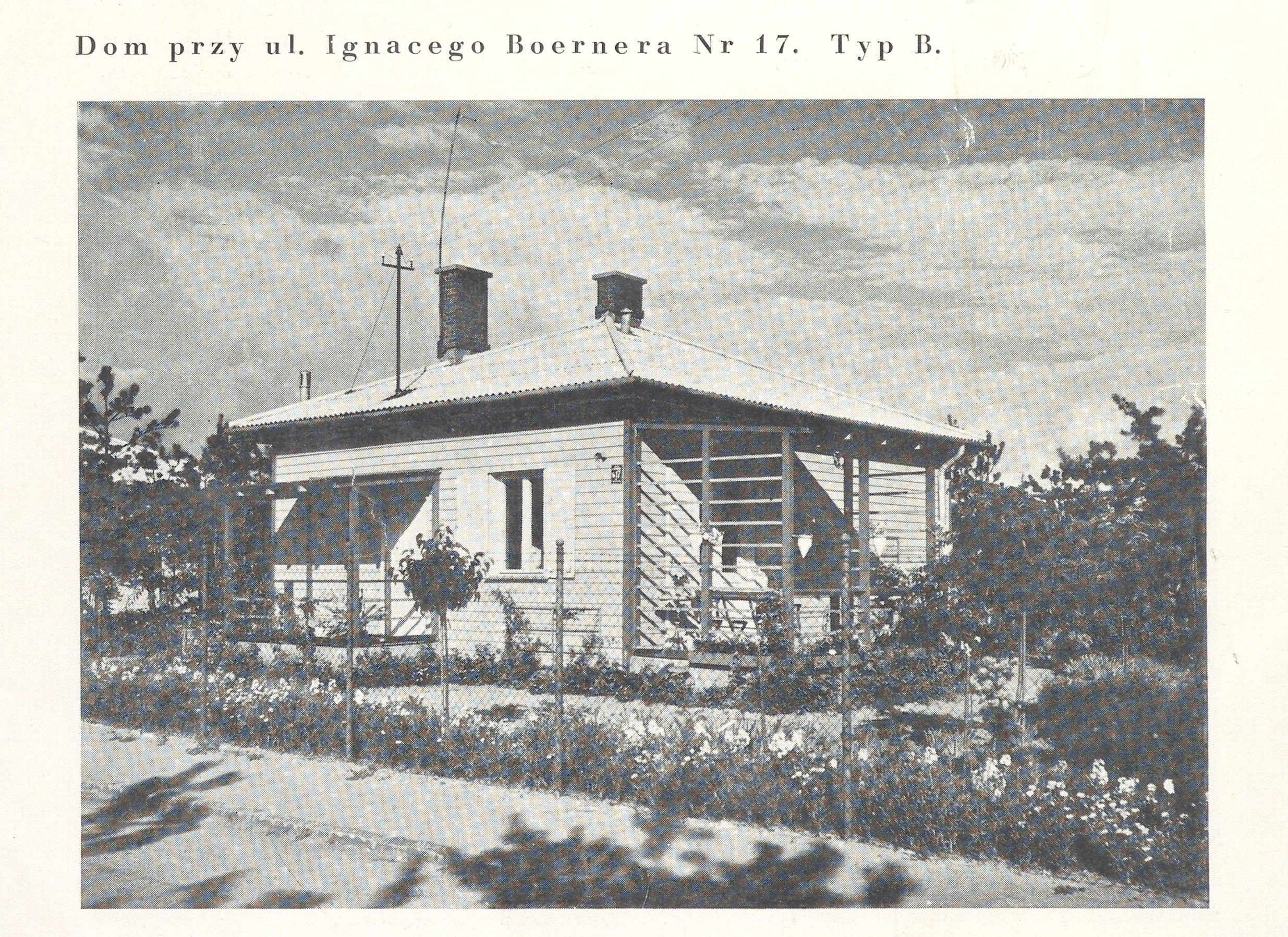 Drewniany dom modułowy (typ B) na osiedlu Boernerowo, zaprojektowany w 1932 roku przez architektkę Wandę Boerner-Przewłocką